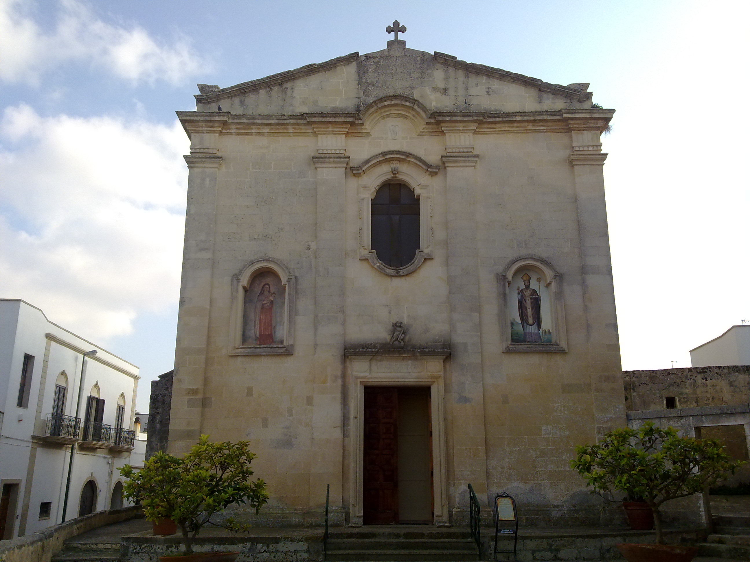 Chiesa Maria SS. della Palma Palmariggi, Lecce